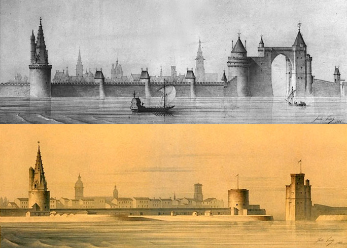 Les tours de La Rochelle d'après Juste Lisch (détails)